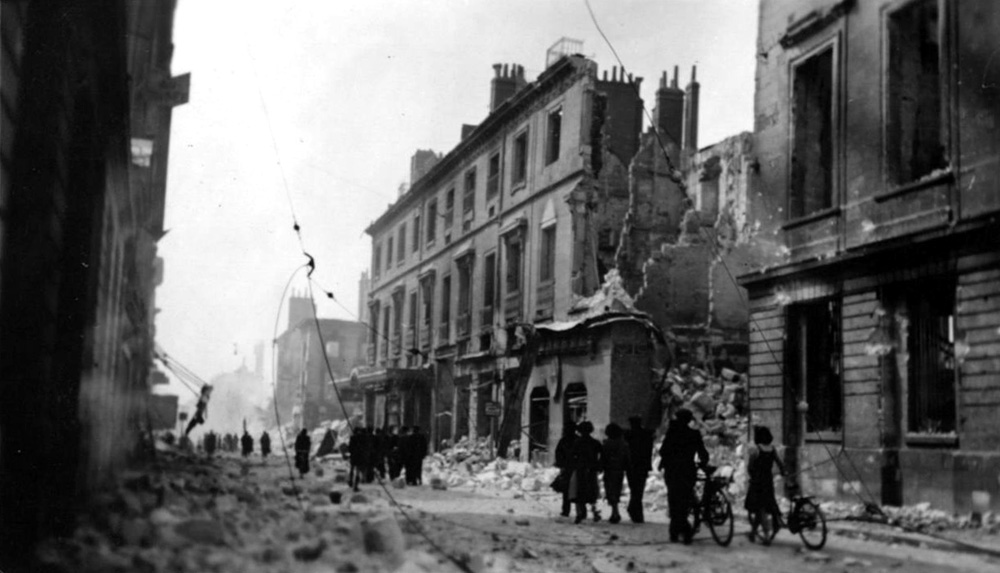 Tours, rue royale, rue nationale, photographie de Jean Chauvin, tout début juillet 1940, palais royal neuf à droite en ruines